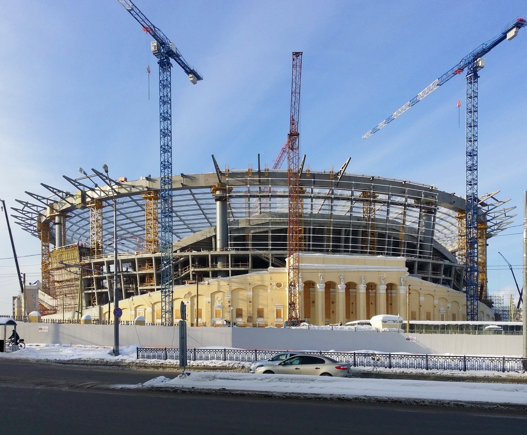 Центральный стадион (Екатеринбург) во время реконструкции к ЧМ-2018, 26 января 2017